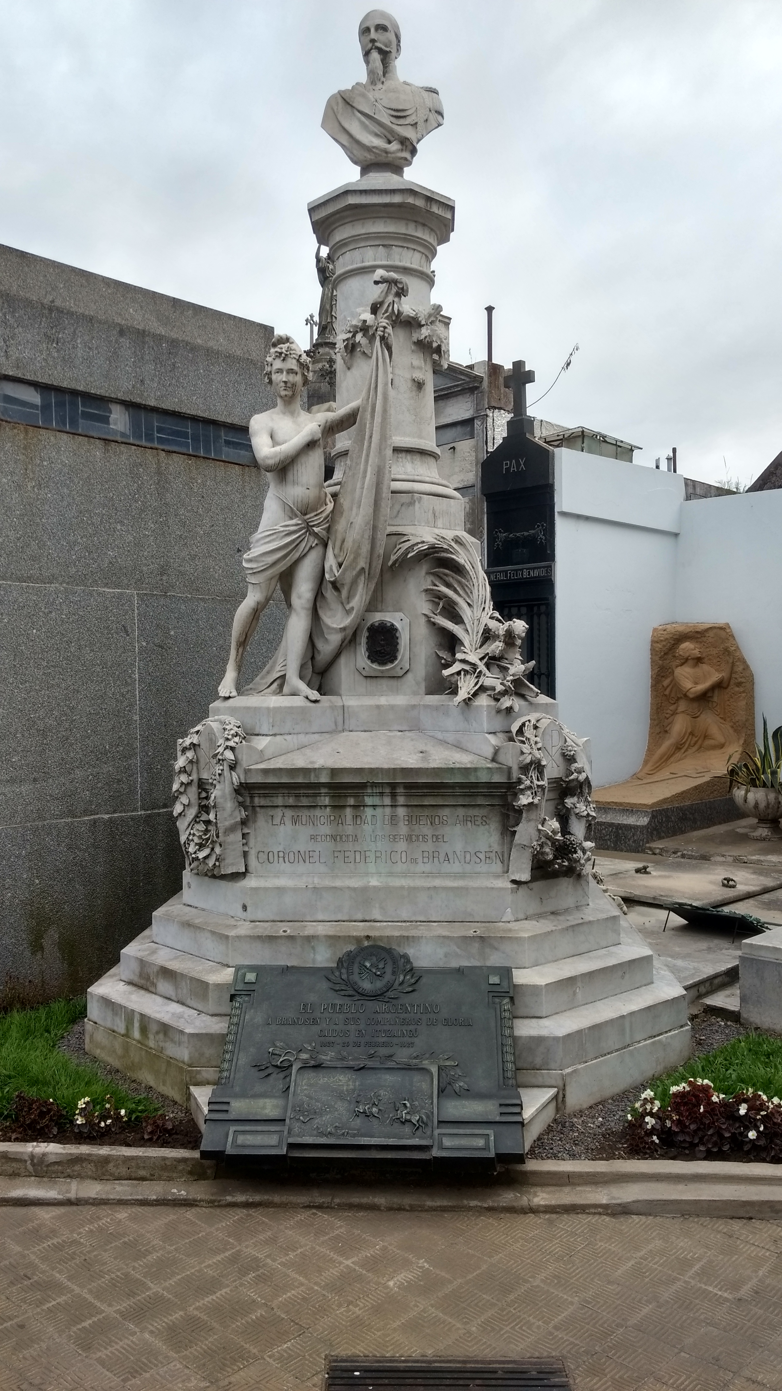 Mausoleo Coronel Federico de Brandsen en el cementerio de la Recoleta